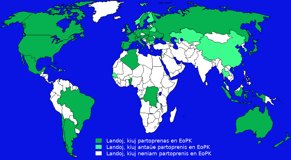 La mapo de partoprentaj en EoPK landoj por la komenco de 2019